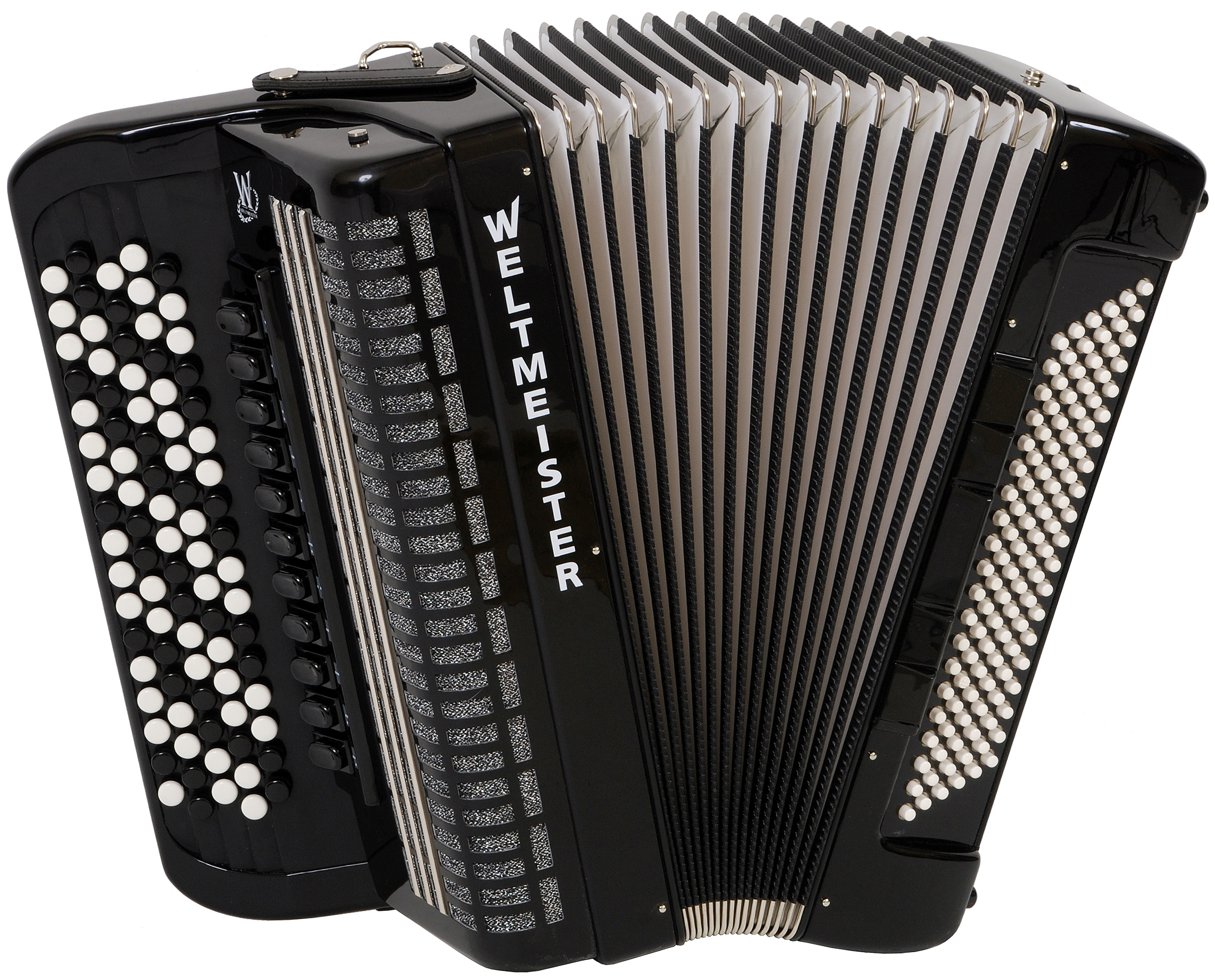 Akordeon guzikowy Special 87 120 IV 11 5 Piccolo firmy Weltmeister